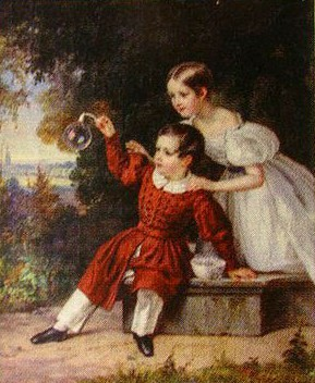 Дети графа Льва Петровича Витгенштейна — Петр (1832—1887) и Мария (1829—1898)